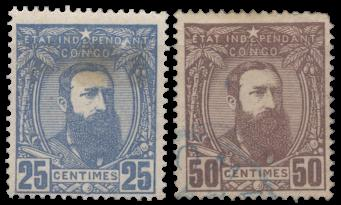 Documents anciens. Domaine public.